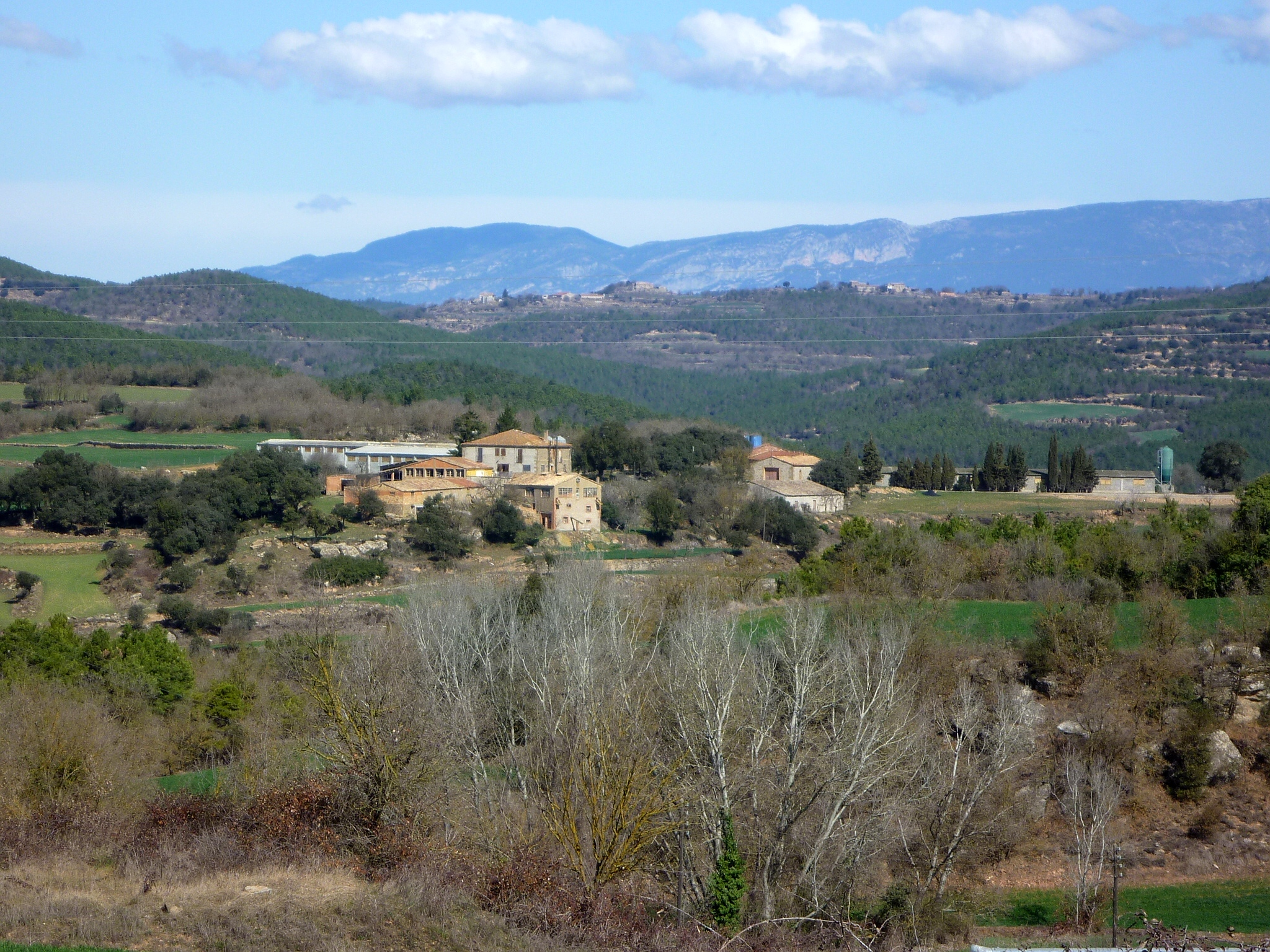 Mas Soldevila (Torà)